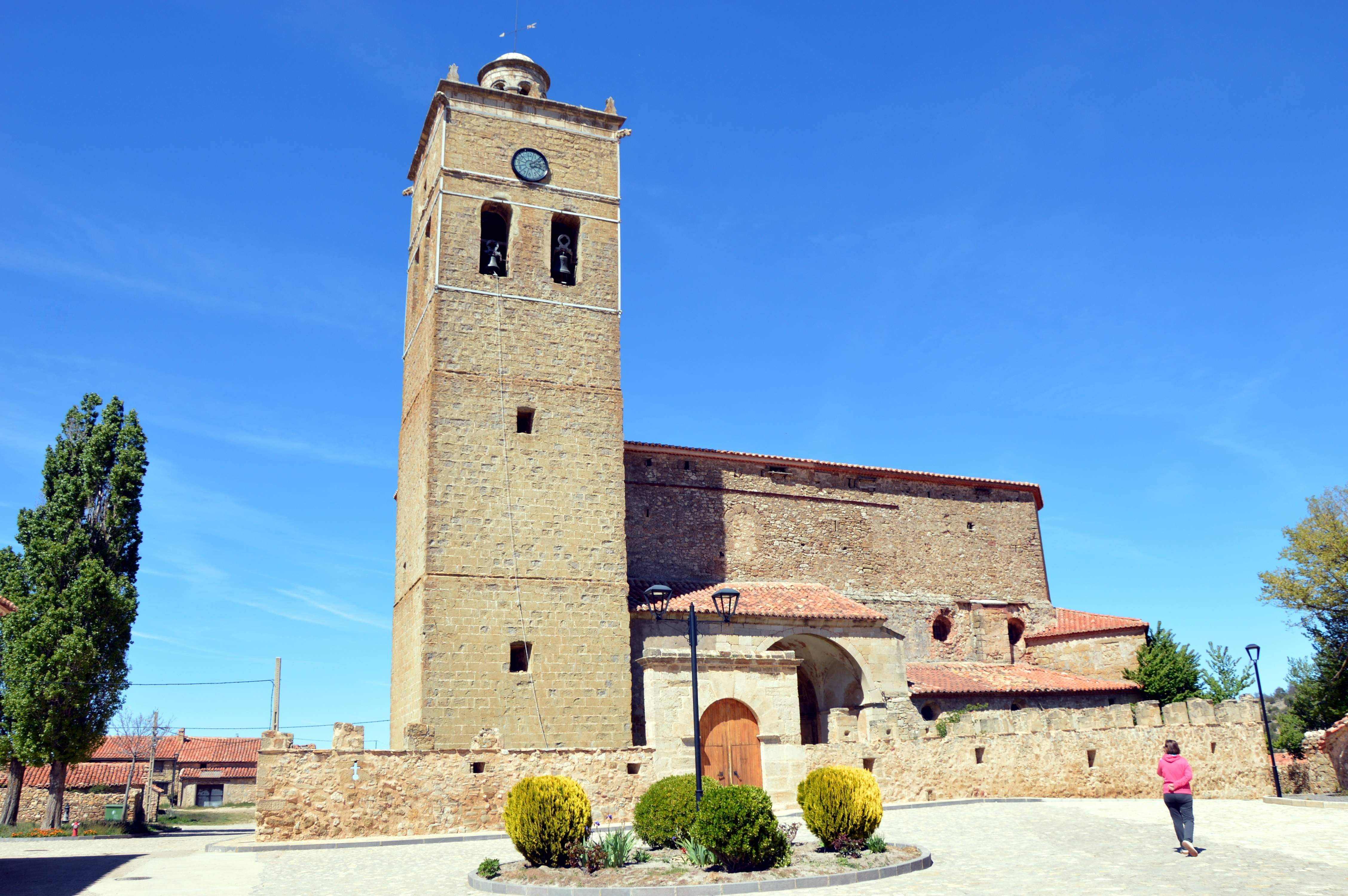 Vista general (meridional) de la iglesia parroquial de Jabaloyas (Teruel), 2017.